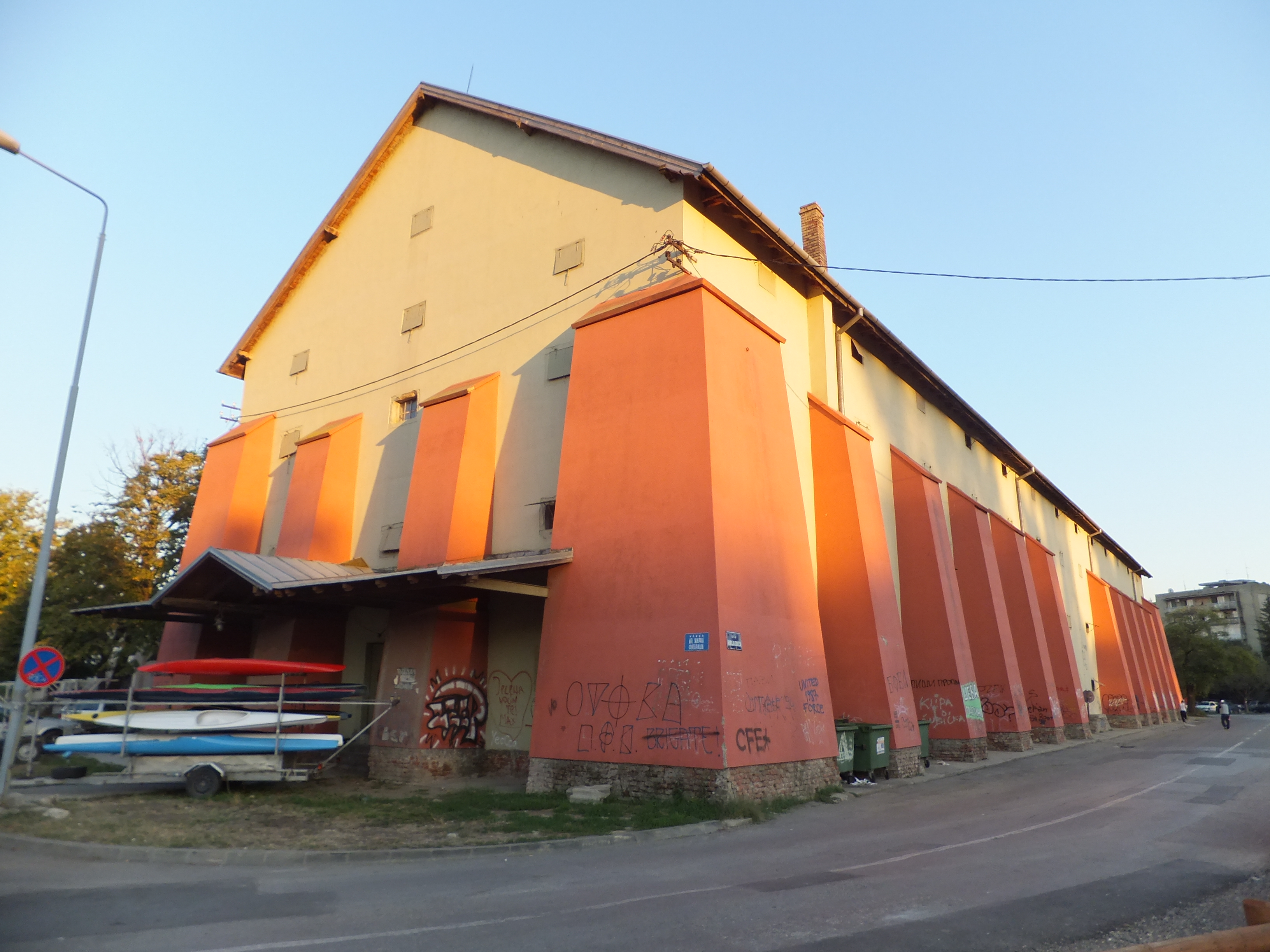 Црвени магацин у Панчеву